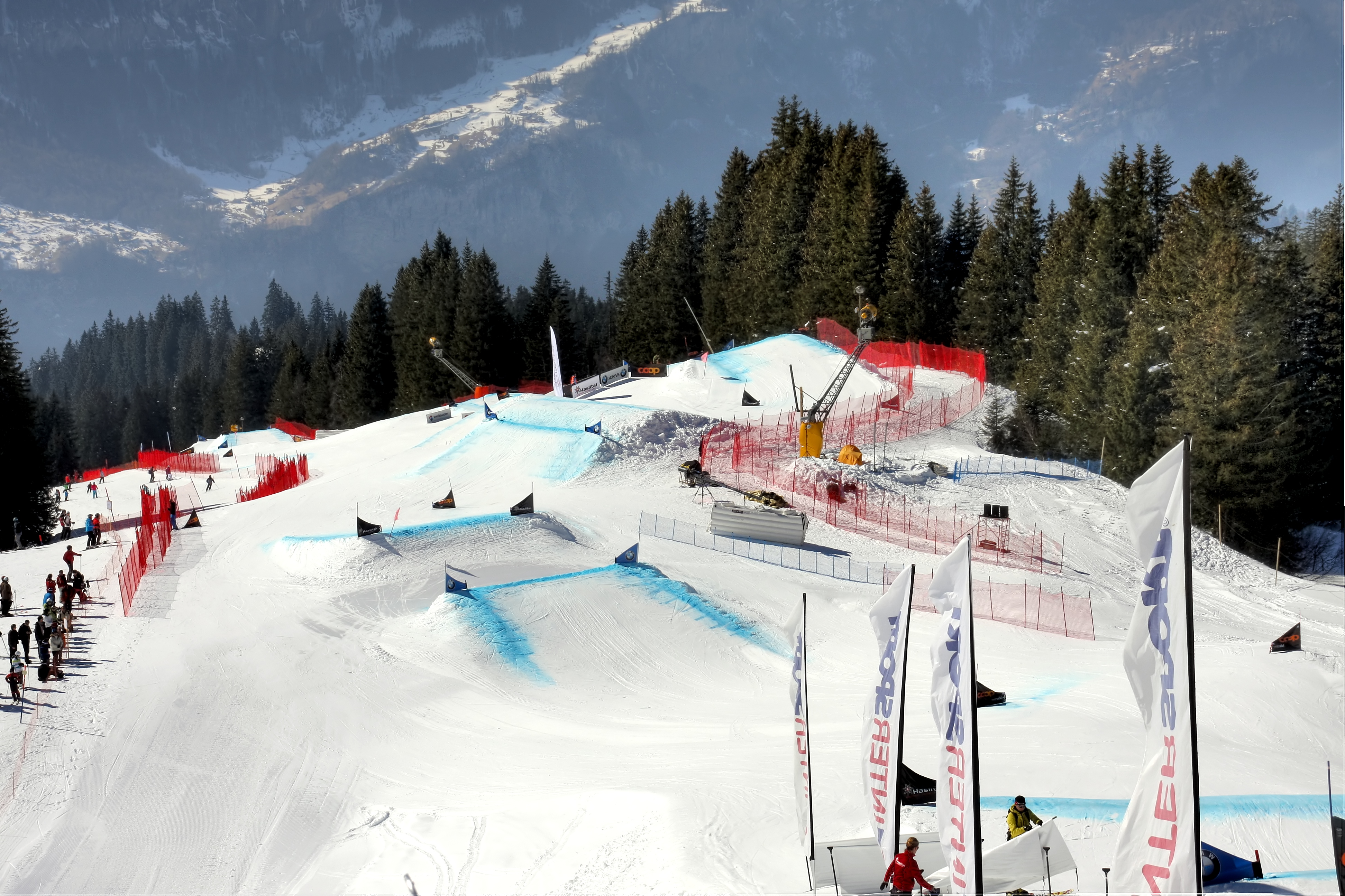 Coop Skicross FIS World Cup - Grindelwald - Meiringen-Hasliberg. Sportanlagen Mägisalp-Bidmi